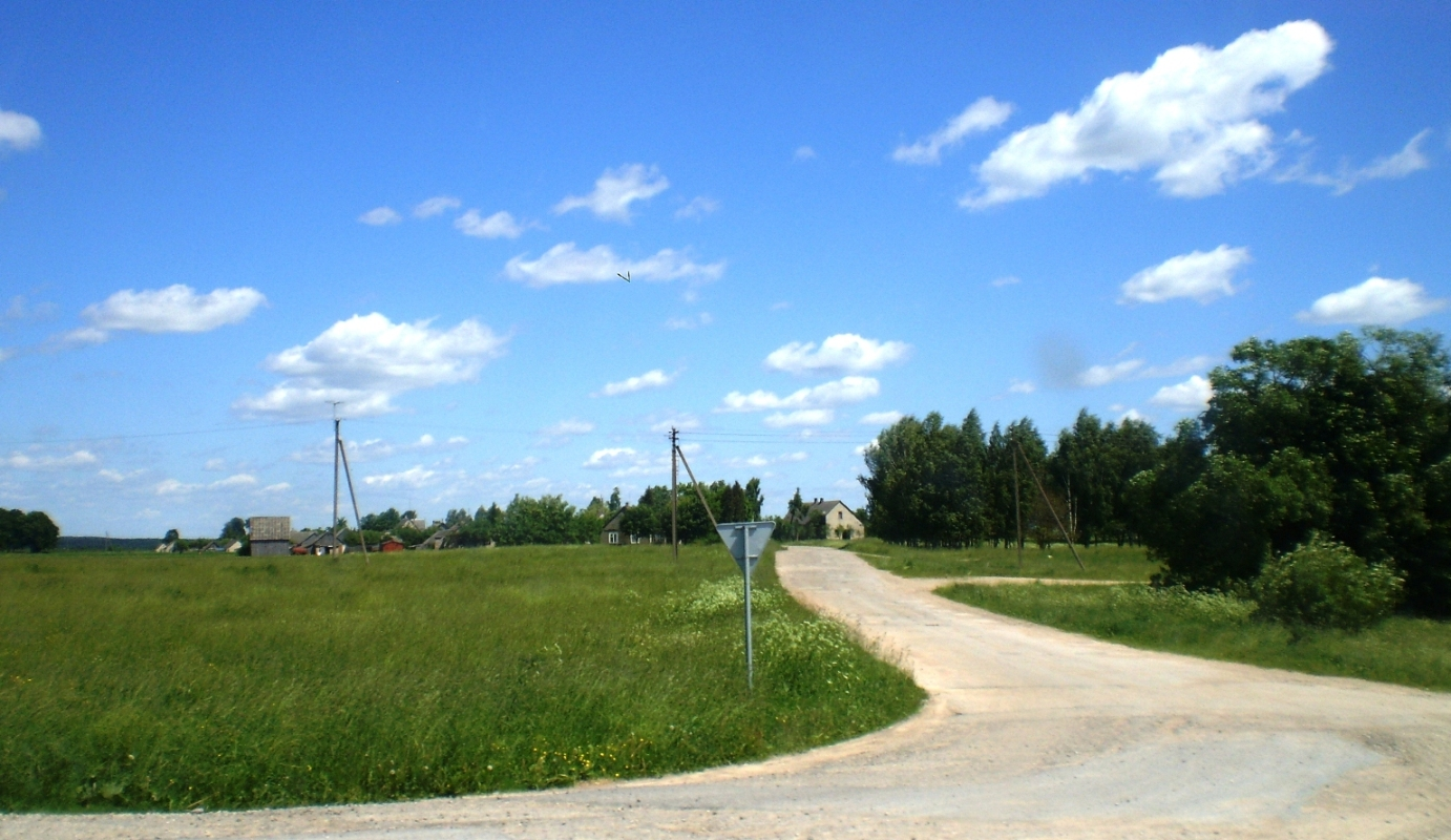 Paežeriai, Kėdainių raj.